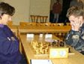 Daniel King und Alexander Khalifman, Deutsche Schachbundesliga, 1. Runde der Saison 1998/99: SG Porz - SV Castrop-Rauxel.